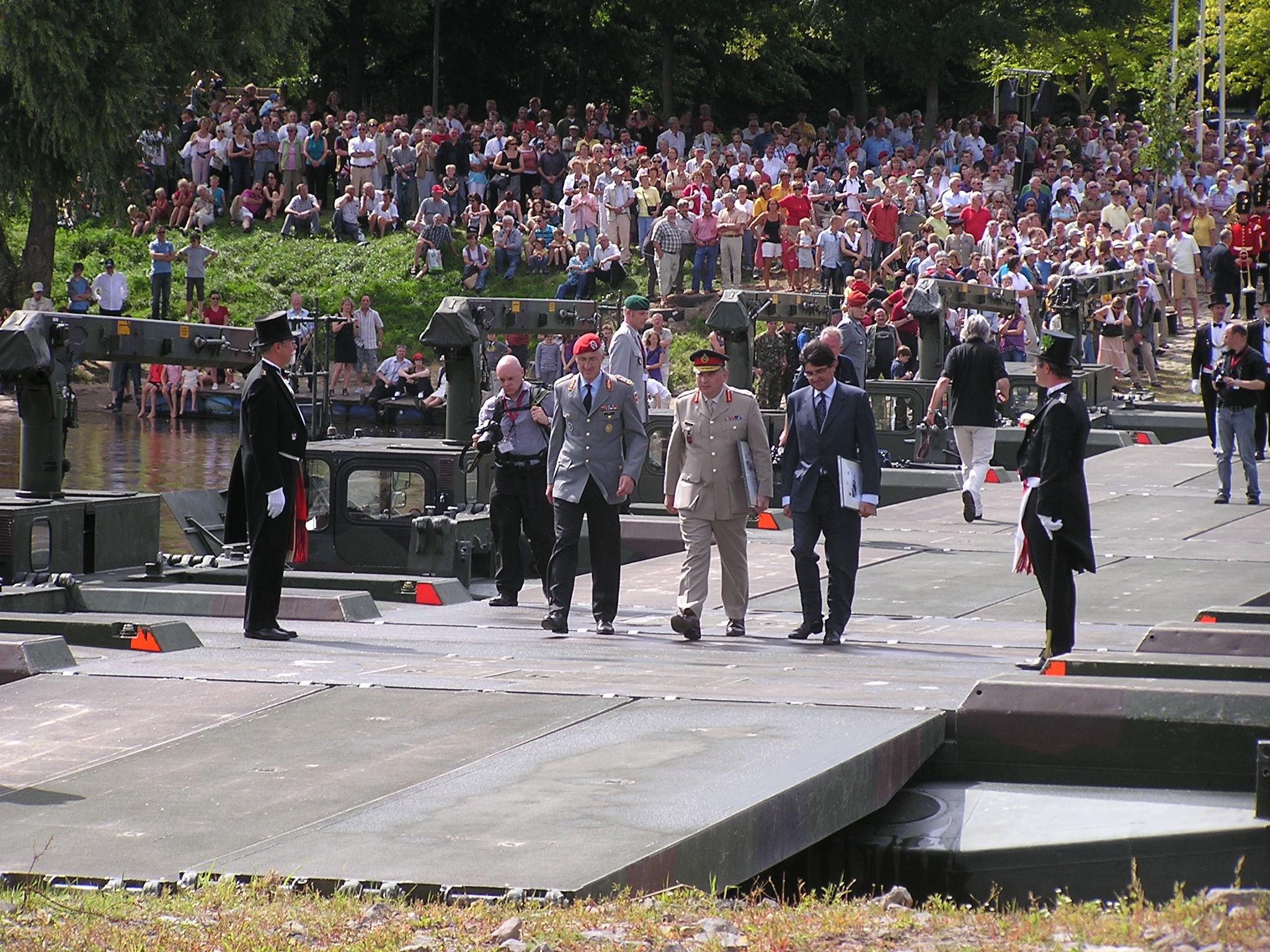 Schlacht bei Minden, Europabrücke, zum 250 jährigen Jubiläum. Generalmajor Markus Kneip (mit roter Kopfbedeckung) beim Übergang über die Weser anlässslich des Jubiläums der Schlacht bei Minden zusammen mit Ehrengästen, u.a. Generalmajor Mungo Melvin, Kommandeur des United Kingdom Support Command Deutschland.